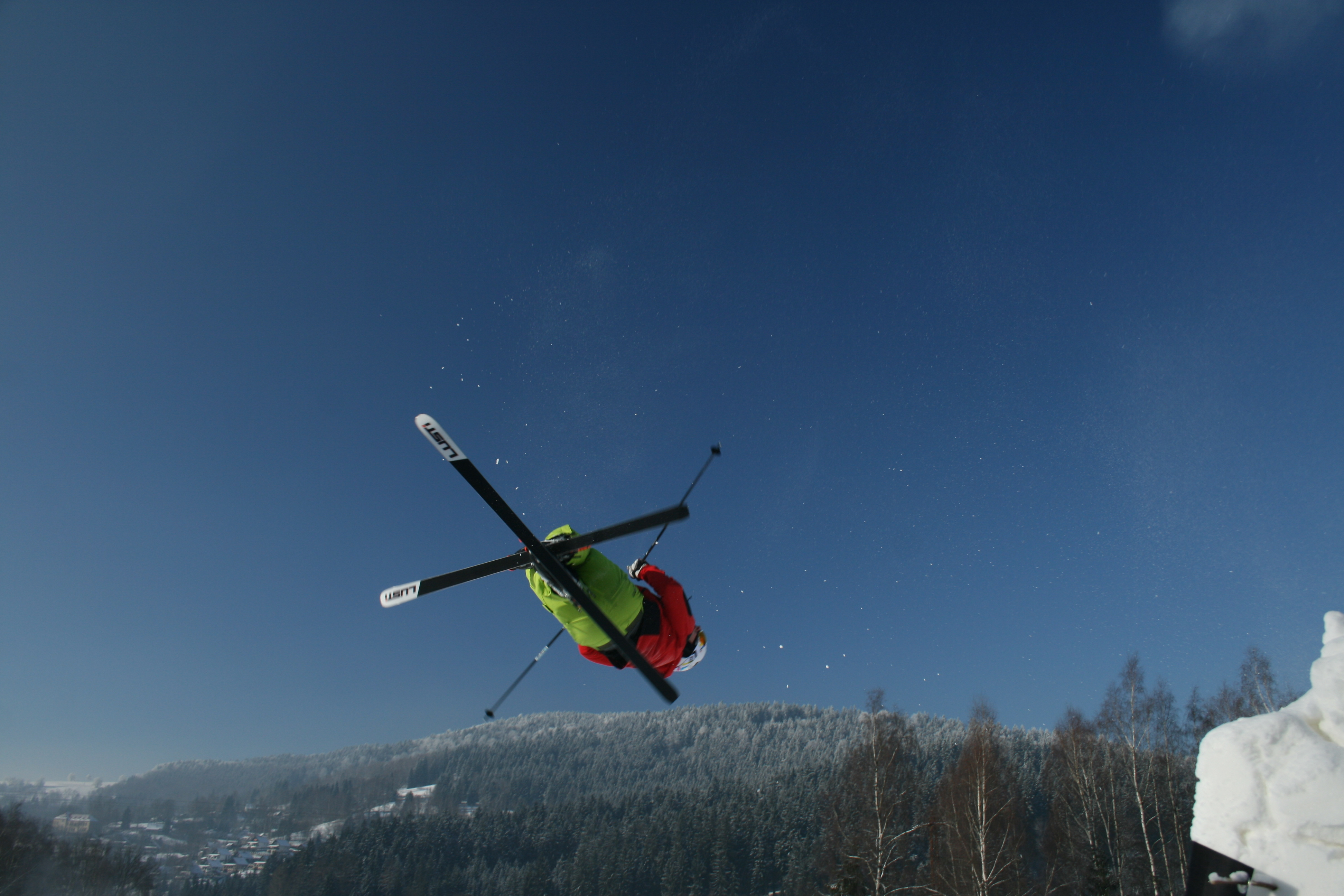 Cork 720